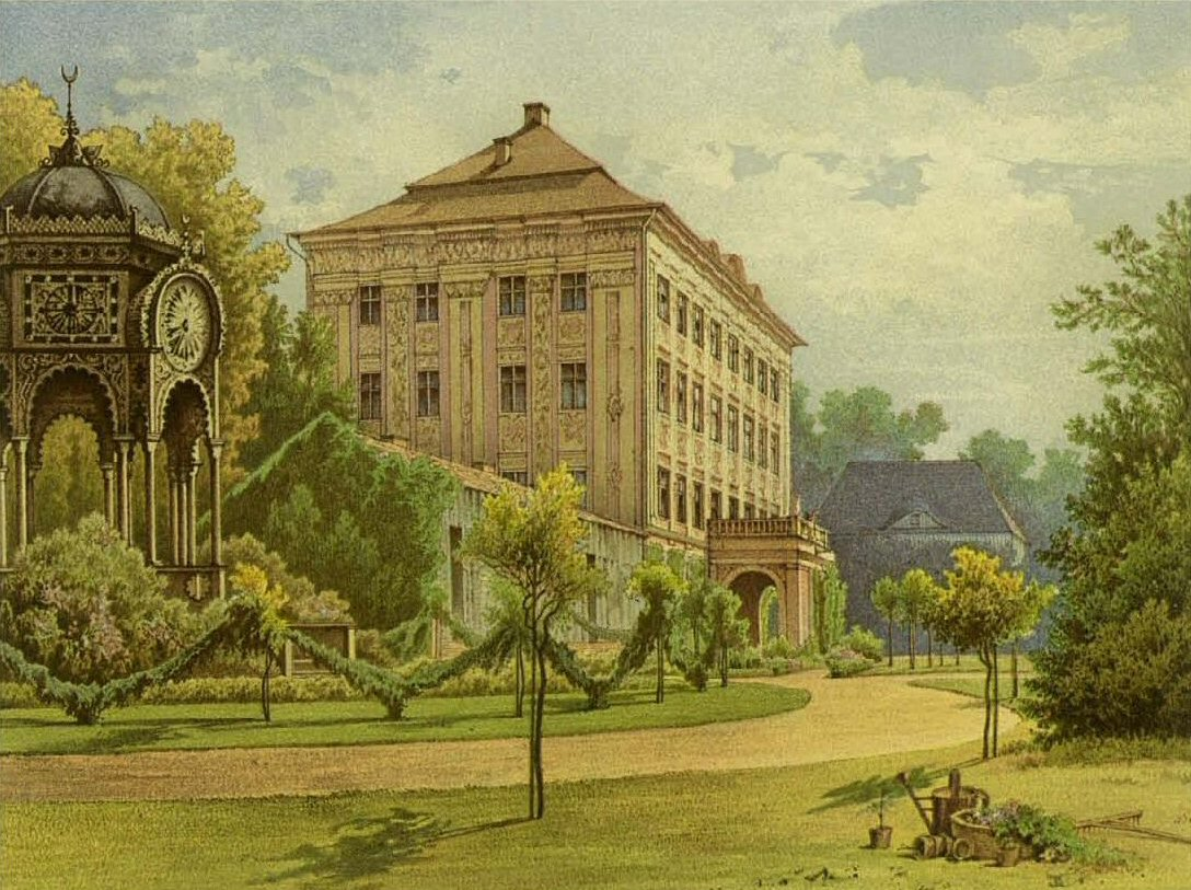 Schloss Gross-Peterwitz , Kreis Trebnitz, Regierungs-Bezirk Breslau Provinz Schlesien